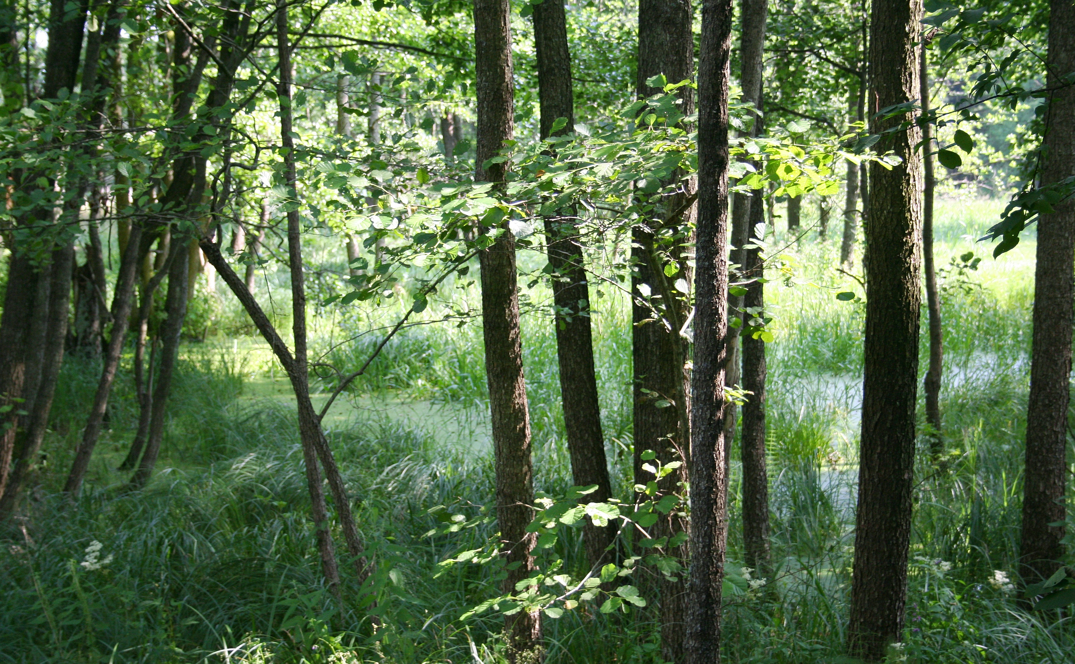 Zbiorowisko leśne nad Rospudą, w Puszczy Augustowskiej.